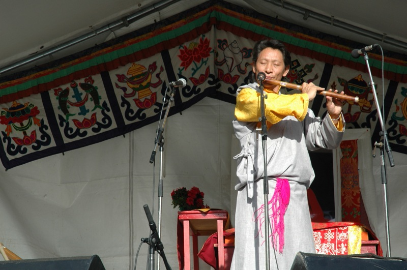 Nawang Khechog at the Festival culturel du Tibet et des peuples de l'Himalaya, 19 September 2004, 5e Festival du Tibet à Vincennes